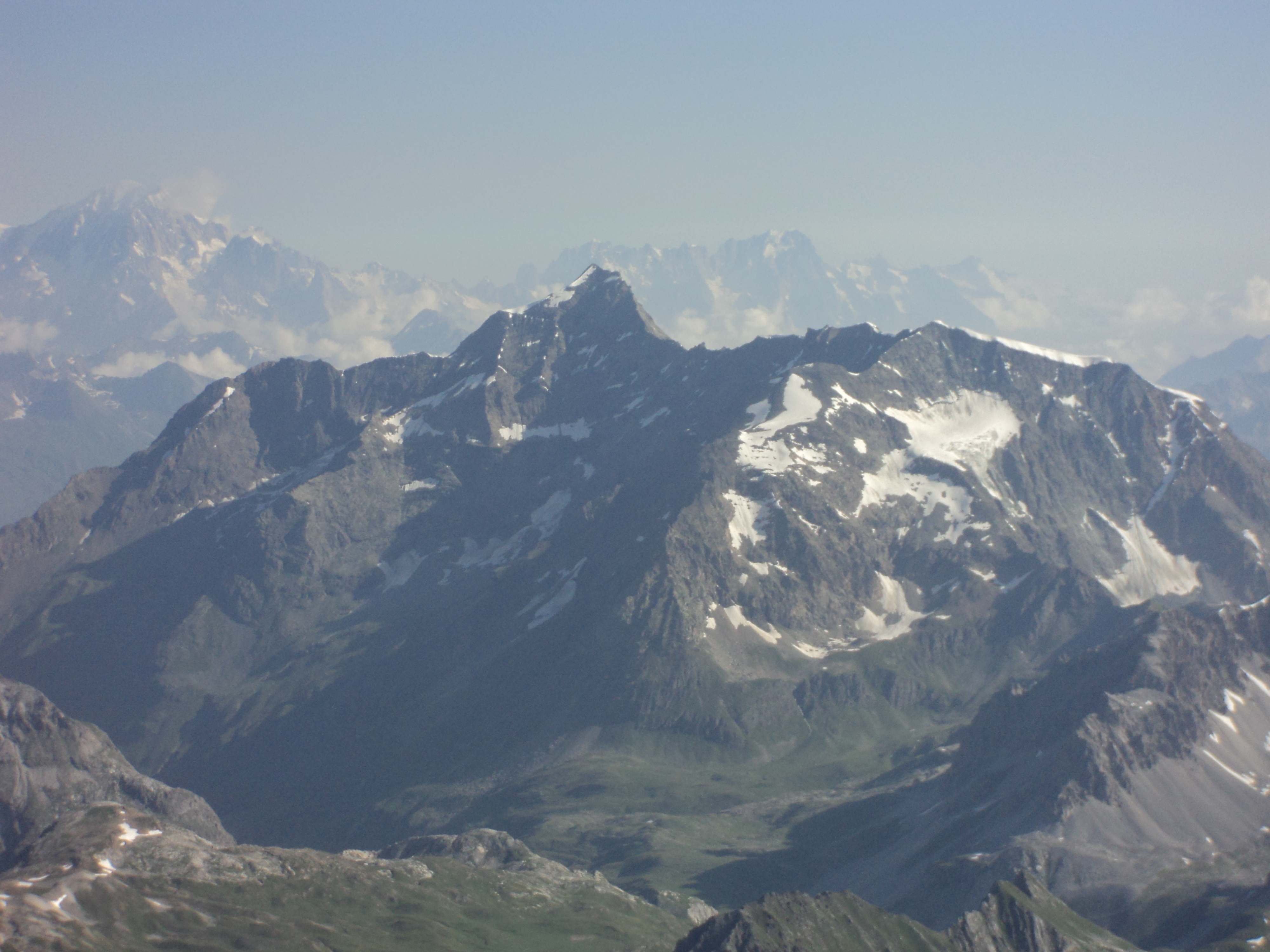 Il Mont Pourri visto dalla vetta della Grande Casse. Sullo sfondo il massiccio del Monte Bianco. In primo piano il Dôme de la Sache.